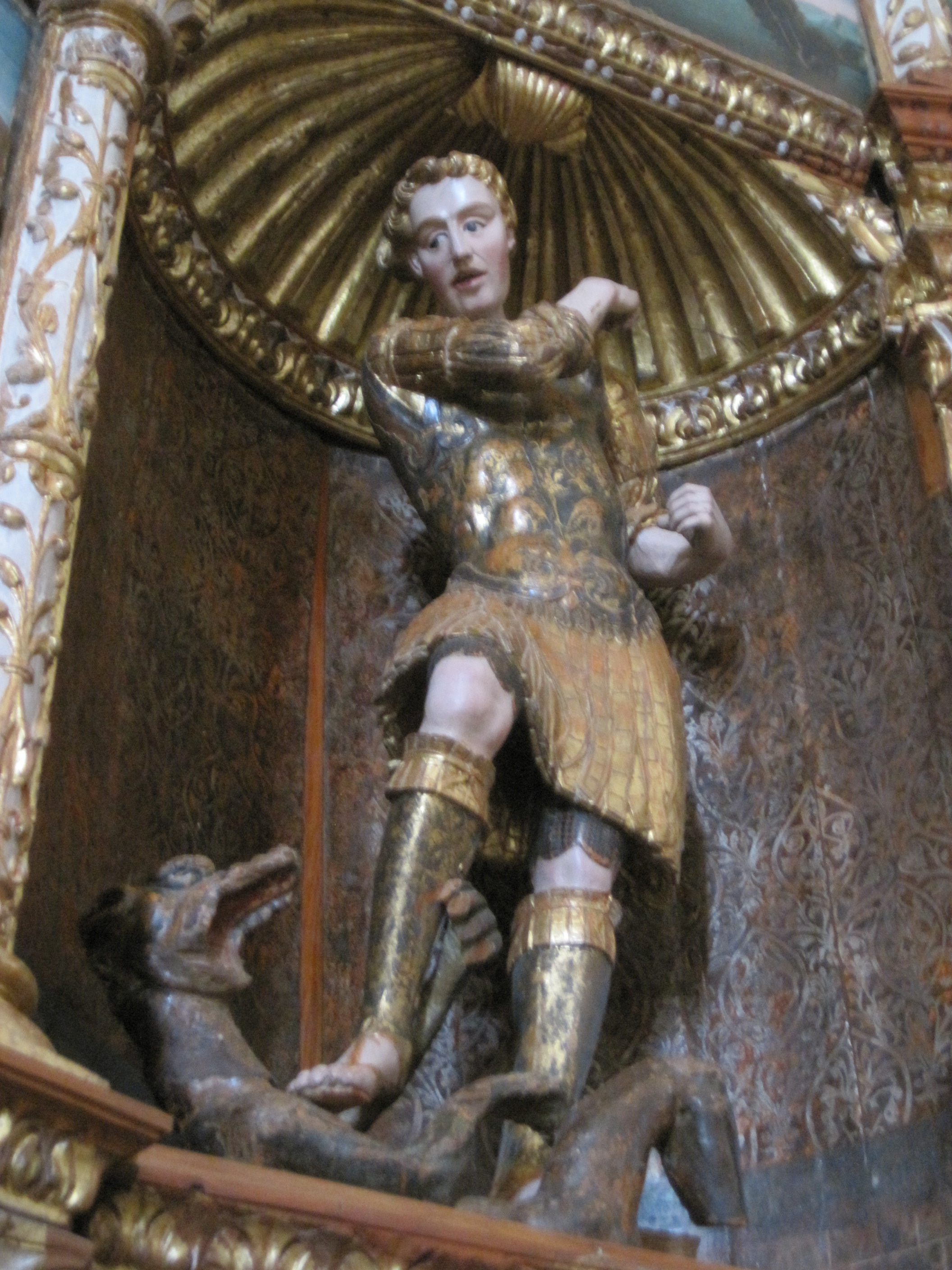 Detalle del retablo de San Miguel, en la iglesia de Ventosa de la Cuesta (Valladolid, España).